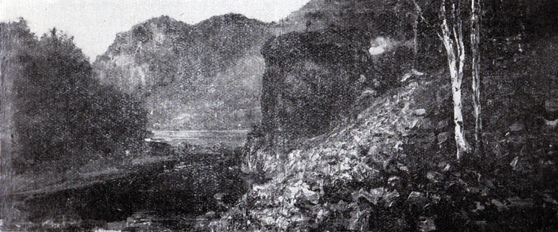 Valea Oltului - pictură monumentală comandată de Ministerul Instrucțiunii Publice în anul 1910. Lucrarea a dispărut ca urmare a bombardamentelor la care a fost supus Bucureștiul în anul 1944